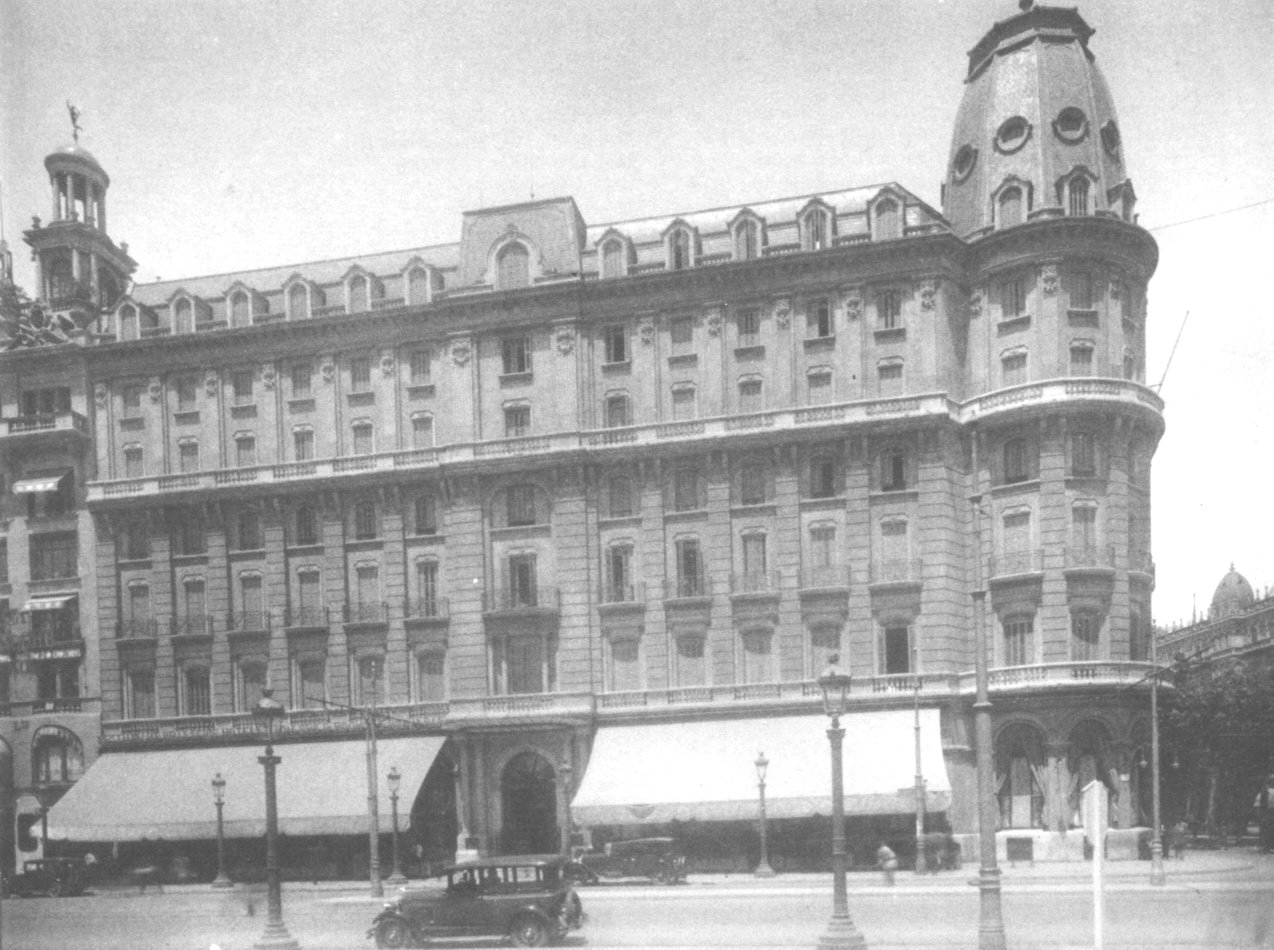 Hotel Colón, de Enric Sagnier (1916)